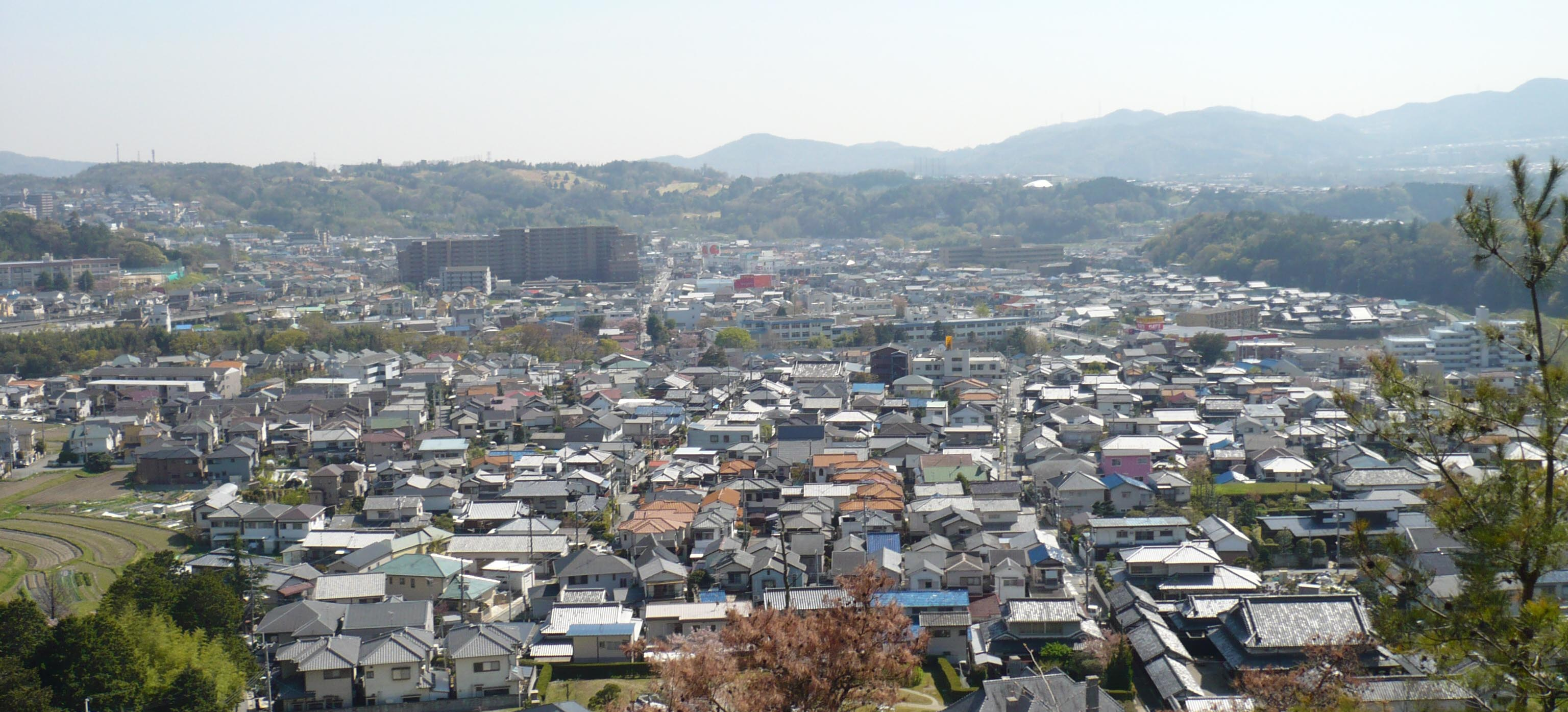 山下城からみた眺望